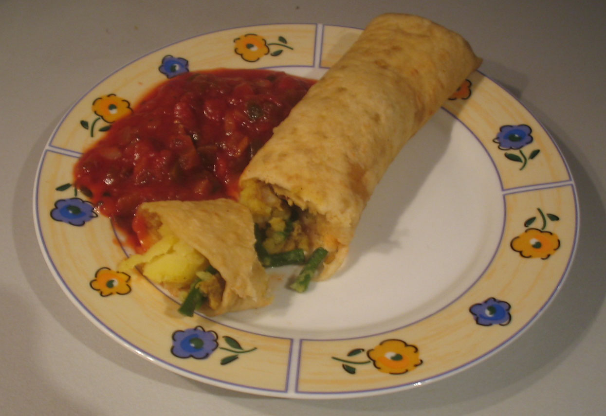 Roti rol